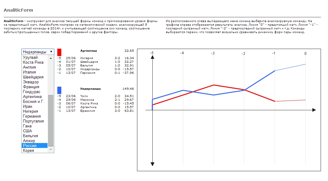 AnaliticForm аналитика формы команд на ЧМ по футболу 2014